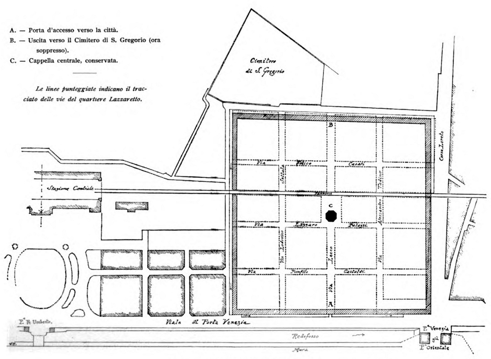 Planimetria del Lazzaretto e delle sue adiacenze; si noti il tracciato della ferrovia che lo attravresa